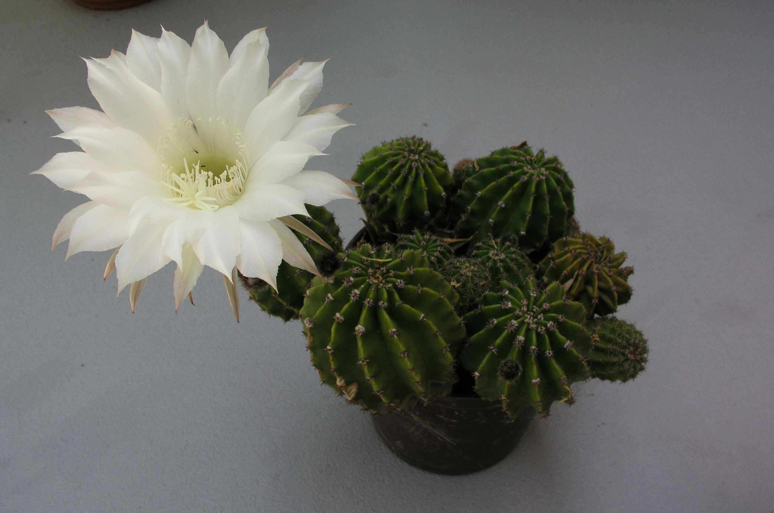 Echinopsis eyriesiiKaktus u cvatu